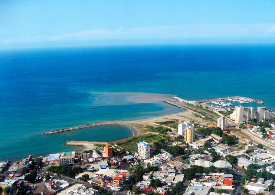 Puerto Viejo, Catia La Mar, estado Vargas